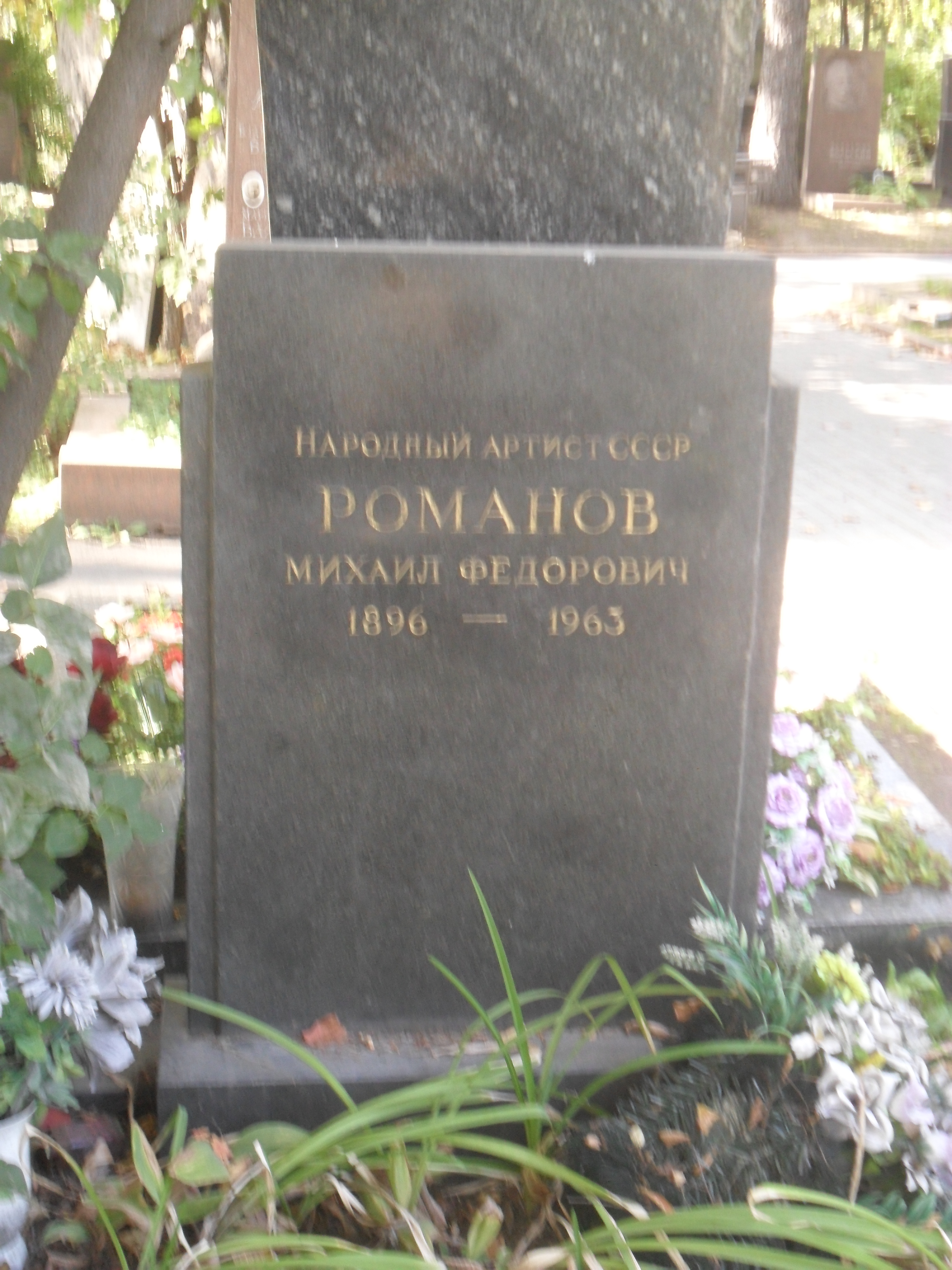 Могила артиста Михаила Романова на Новодевичьем кладбище Москвы.